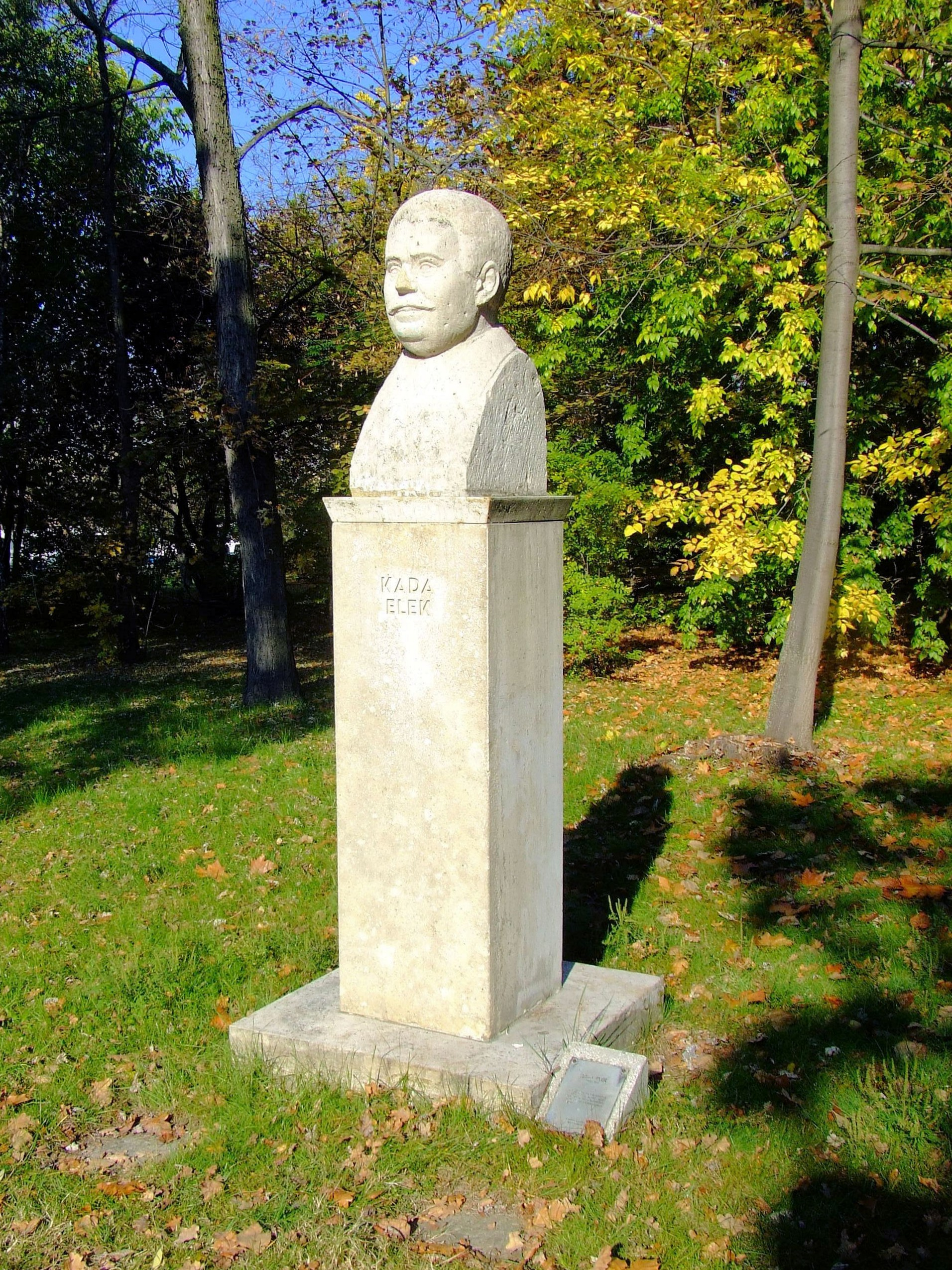 Kada Elek (1852–1913) Kecskemét polgármestere, író mellszobra a kecskeméti Katona József parkban. Tóth Sándor szobrászművész alkotása (1968)